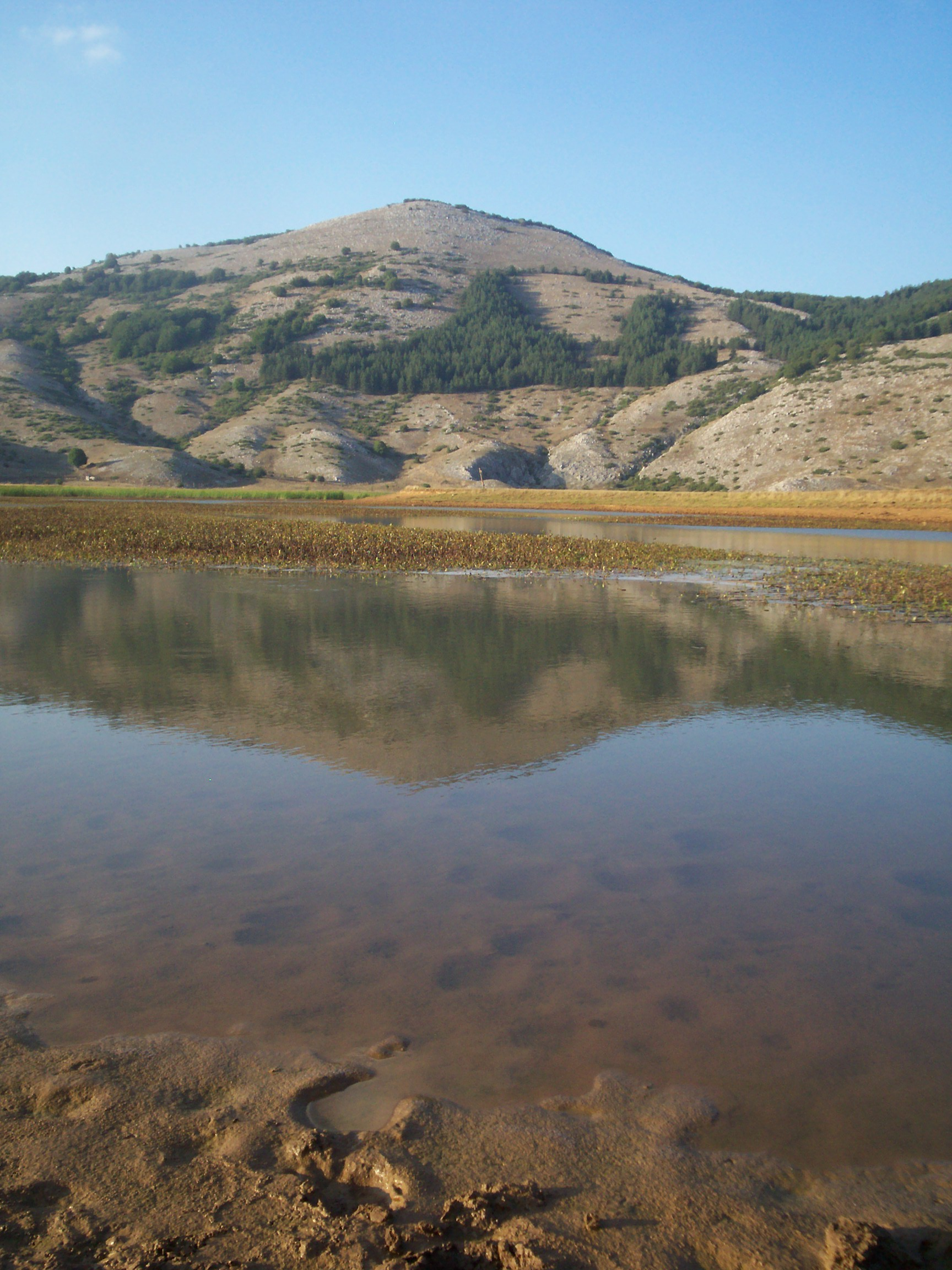 Lago di Rascino (09.2009)